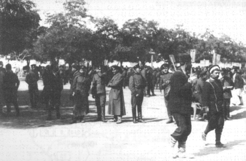 Мобилизация на Първи пехотен софийски полк и Шести пехотен търновски полк в София